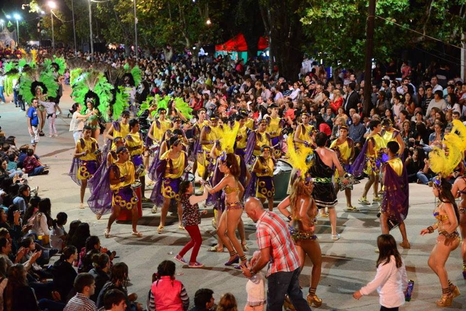 Comparsa de Maipu